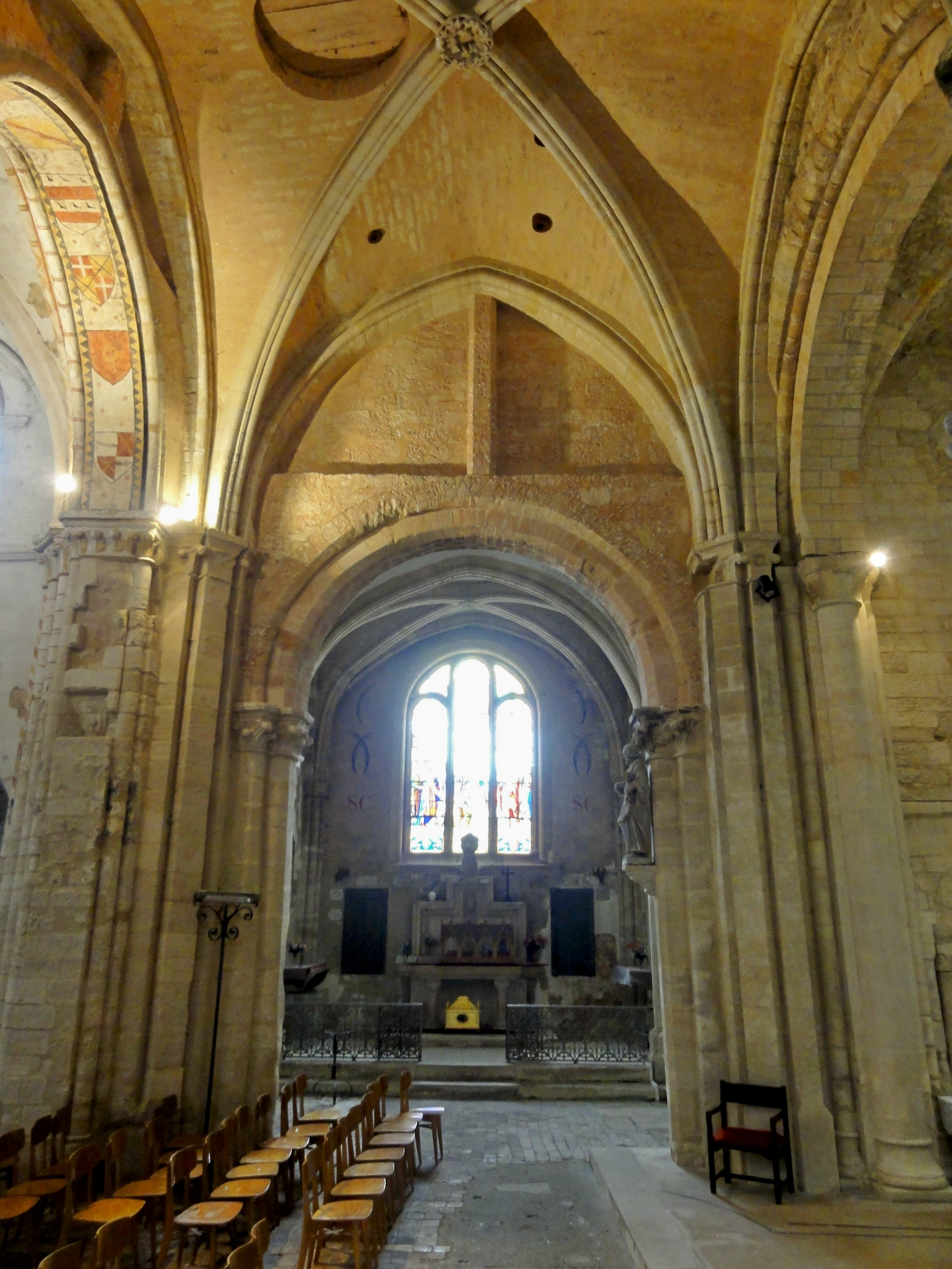 Transept, vue sud-nord.